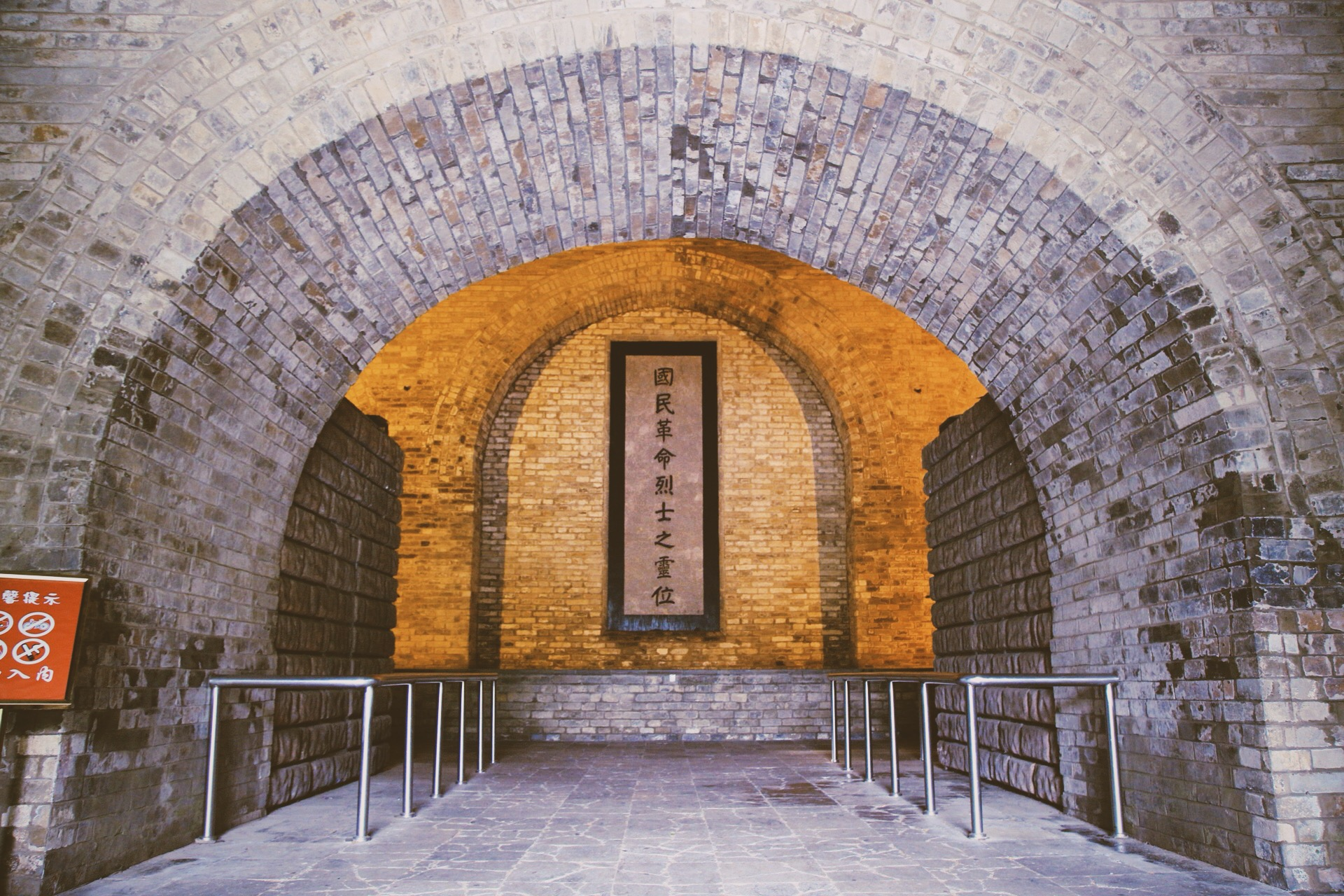 中文（中国大陆）: 南京灵谷寺内“国民革命烈士之灵位”碑